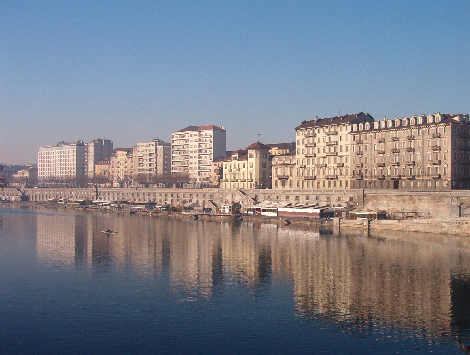 I Murazzi e lungo Po - Turin - Italy